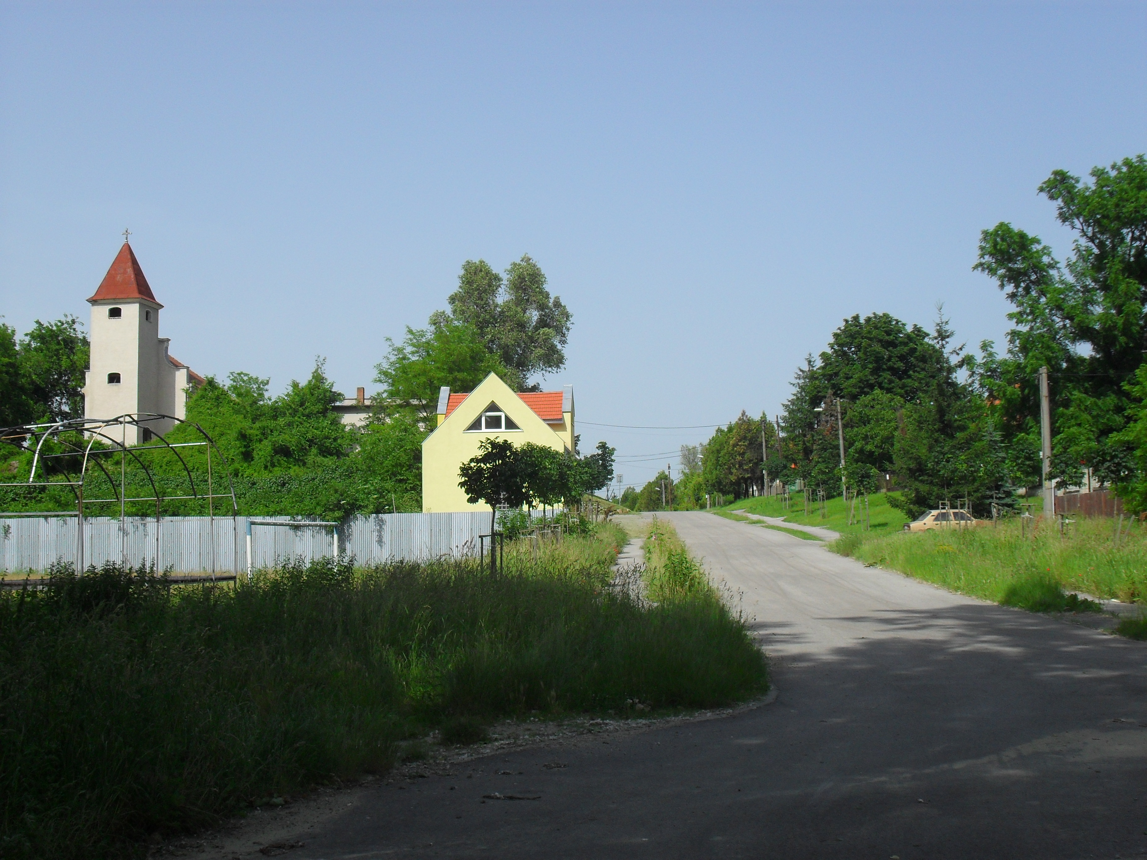 Virt - utcakép